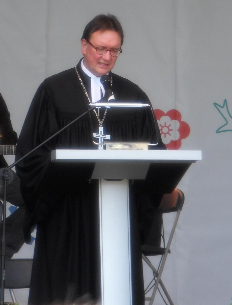 Martin Hein bei dem ersten Gottesdienst auf der Hauptbühne (im Goldsteinpark) auf der Landesgartenschau Bad Nauheim 2010.